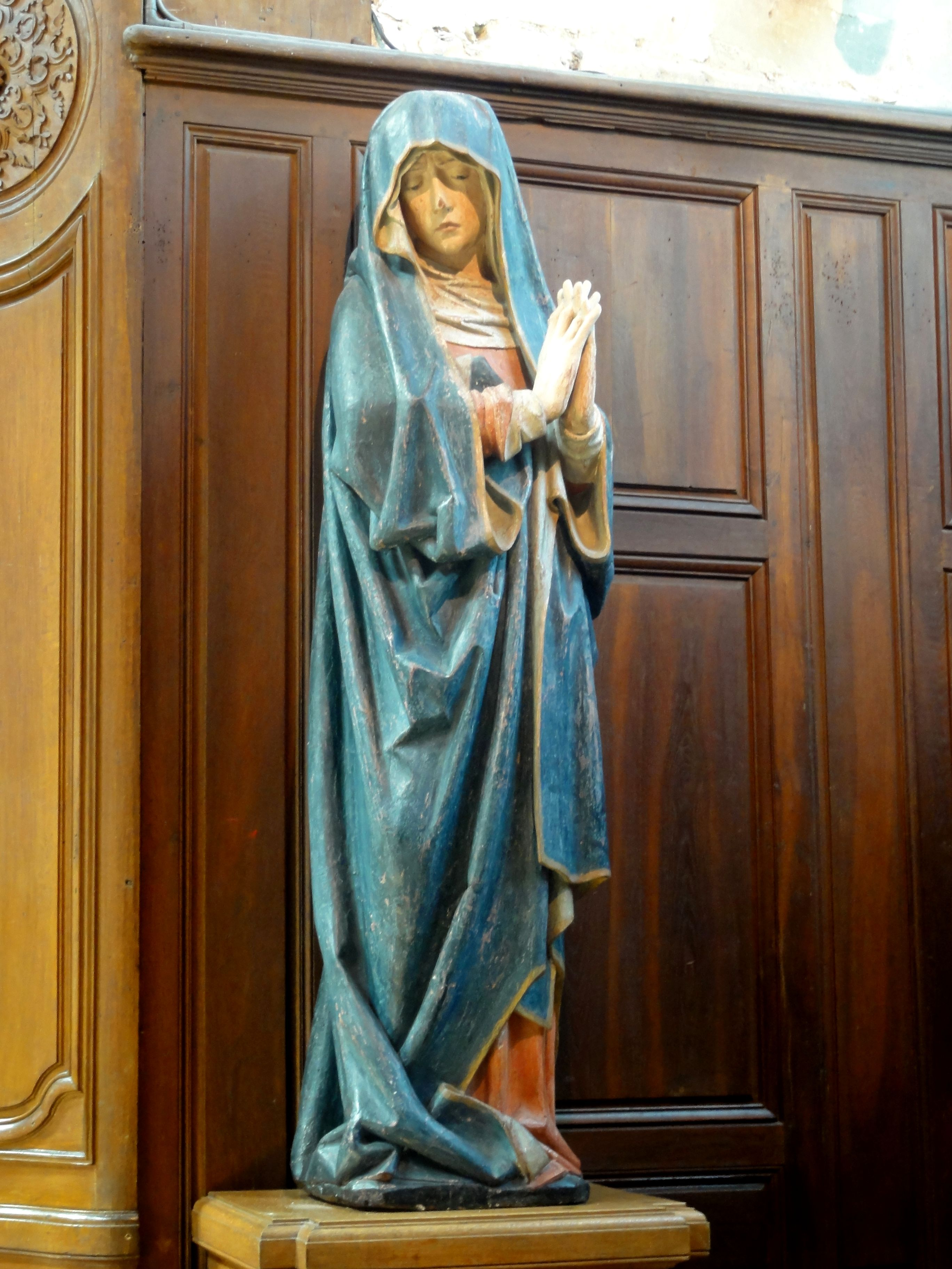 Vierge du poutre de gloire.